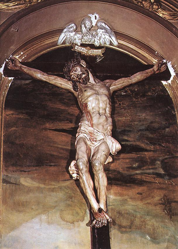 Cristo crucificado de Juan de Juni. Conservado en el Monasterio de Santa Catalina de Siena (Valladolid, Castilla y León, España) Se dice que a sus pies está enterrado el autor.